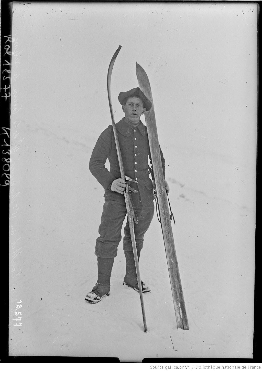 Le Lioran, 12/2/11, Couthet du 11e chasseurs, g[agnan]t de la course de vitesse : [photographie de presse] / [Agence Rol]